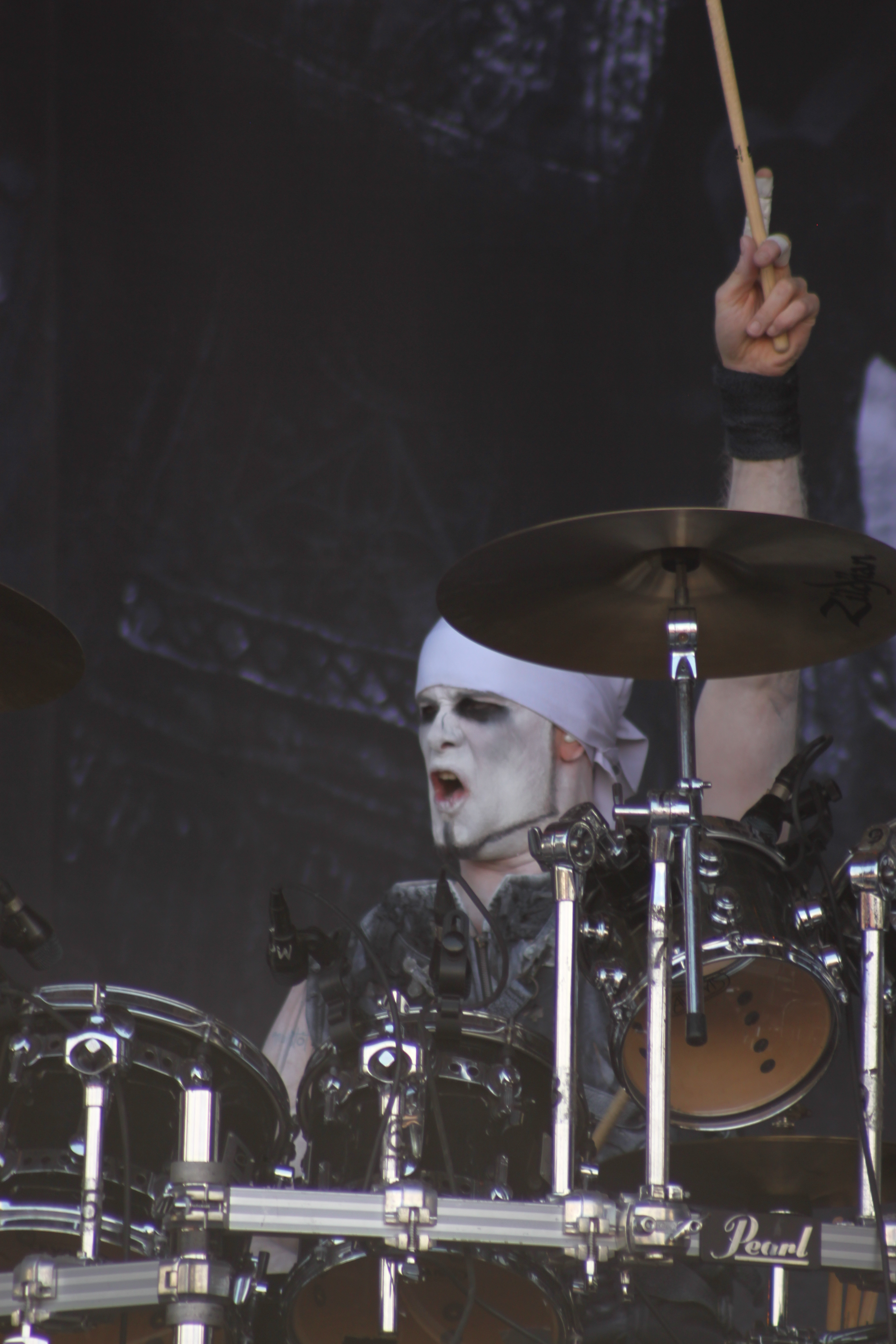 Hellfest 2014. Roel van Helden, Powerwolf. Fr-44-Clisson.